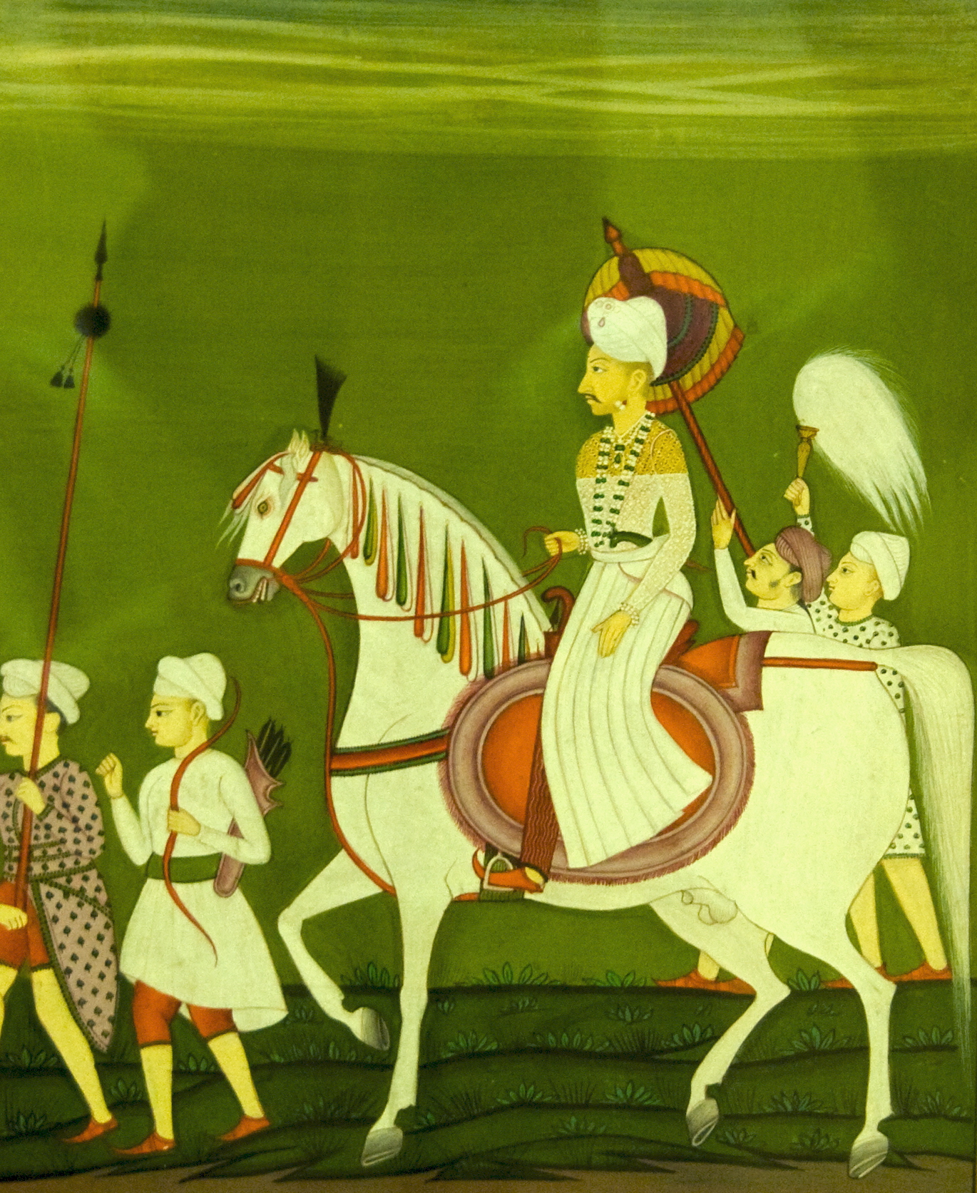 Peshwa Balaji Bajirao. Prince of Wales museum, Mumbai.